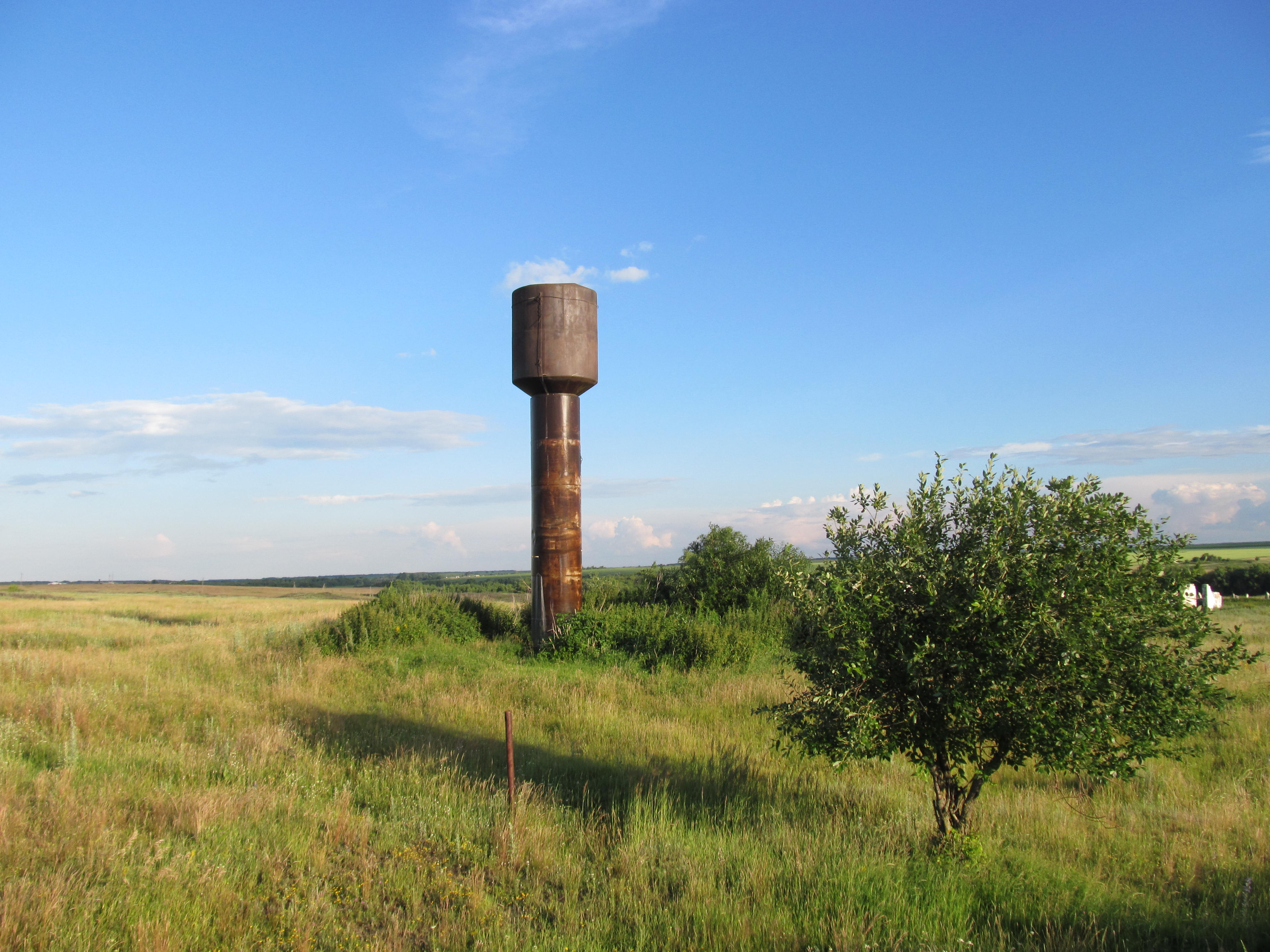 Башня водонапорная в деревне Исаевка Тамалинского района Пензенской области